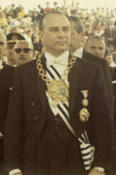 Presidente de Uruguay, Jorge Pacheco Areco, en la Parada Militar en el Parque O'Higgins, Chile.